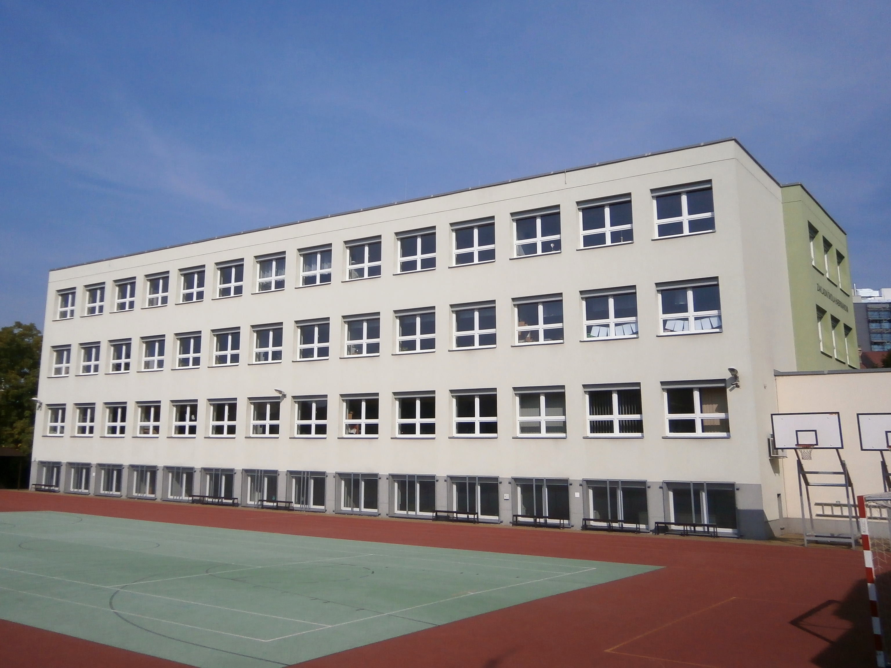 ZŠ Habrmanova (Hradec Králové)